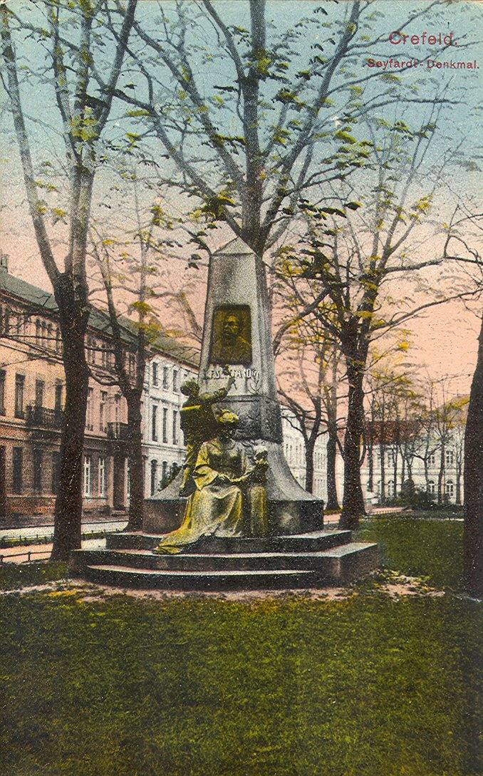 Denkmal für Ludwig Friedrich Seyffardt auf dem Ostwall in Krefeld